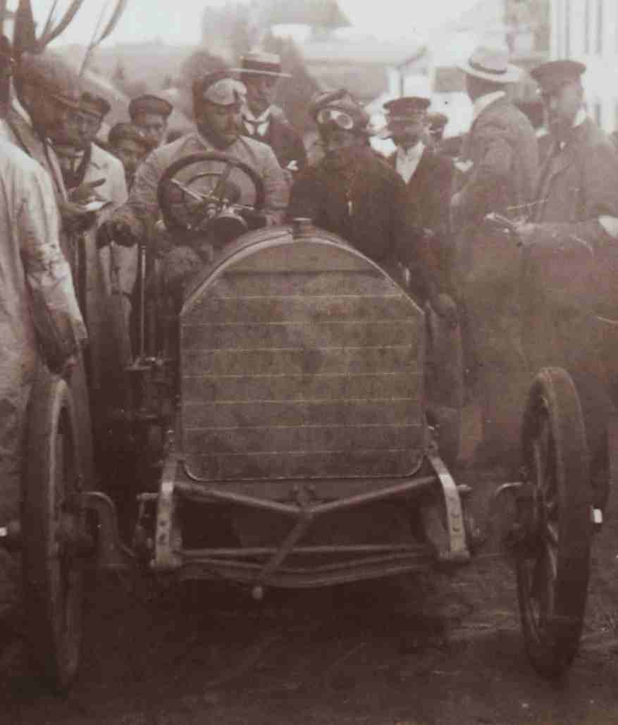 [Collection Jules Beau. Photographie sportive] : T. 27. Année 1904 / Jules Beau : F. 28. [Circuit des Ardennes, Bastogne, 25 juillet 1904]